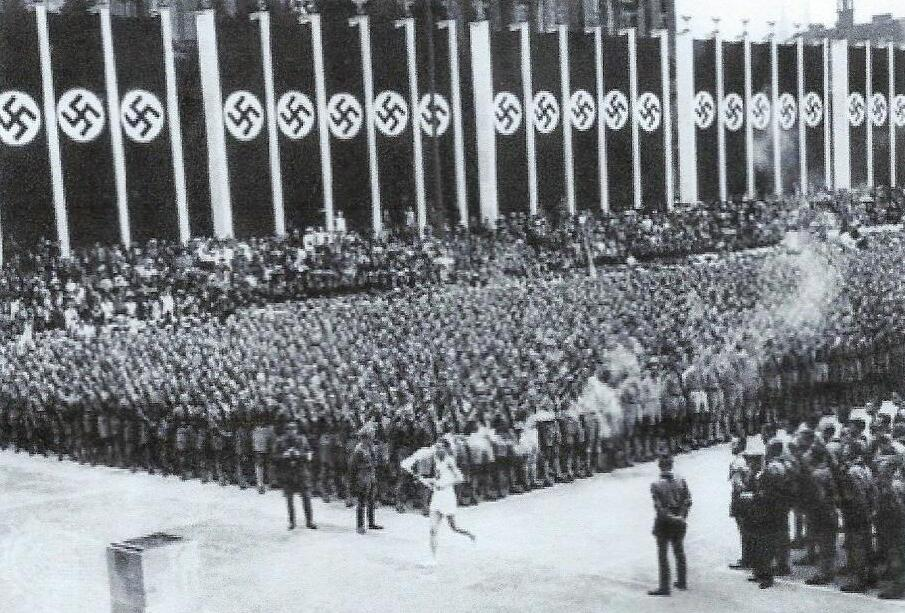 Arrivée du relais de la flamme aux Jeux de 1936 (Berlin)